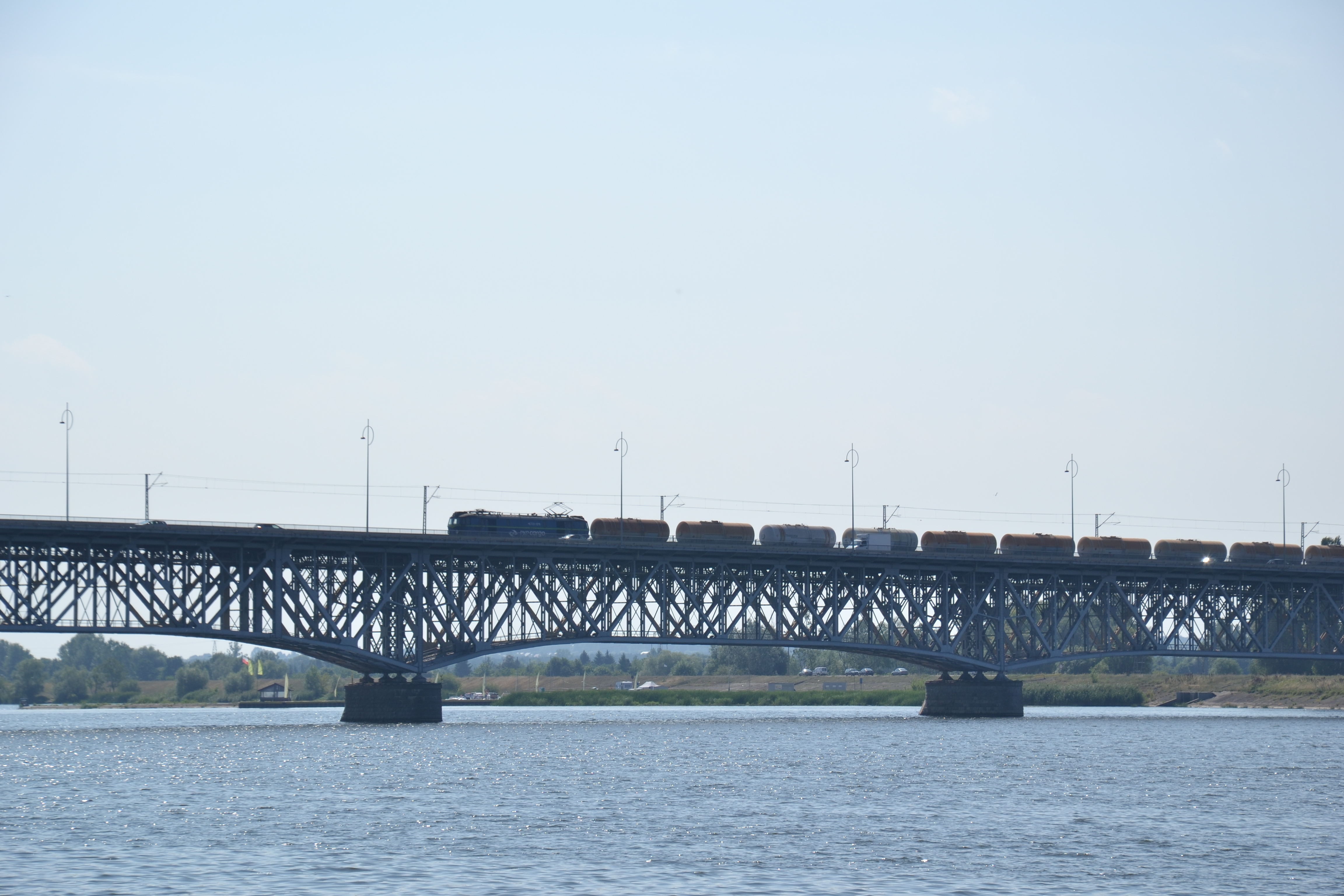 ET22 PKP Cargo z pociągiem towarowym przejeżdżają przez most kolejowo-drogowy w Płocku This photo was taken during Railway Wikiexpedition 2015 set up by Wikimedia Polska Association in cooperation with Fundacja Grupy PKP. You can see all photographs in category Wikiekspedycja kolejowa 2015.